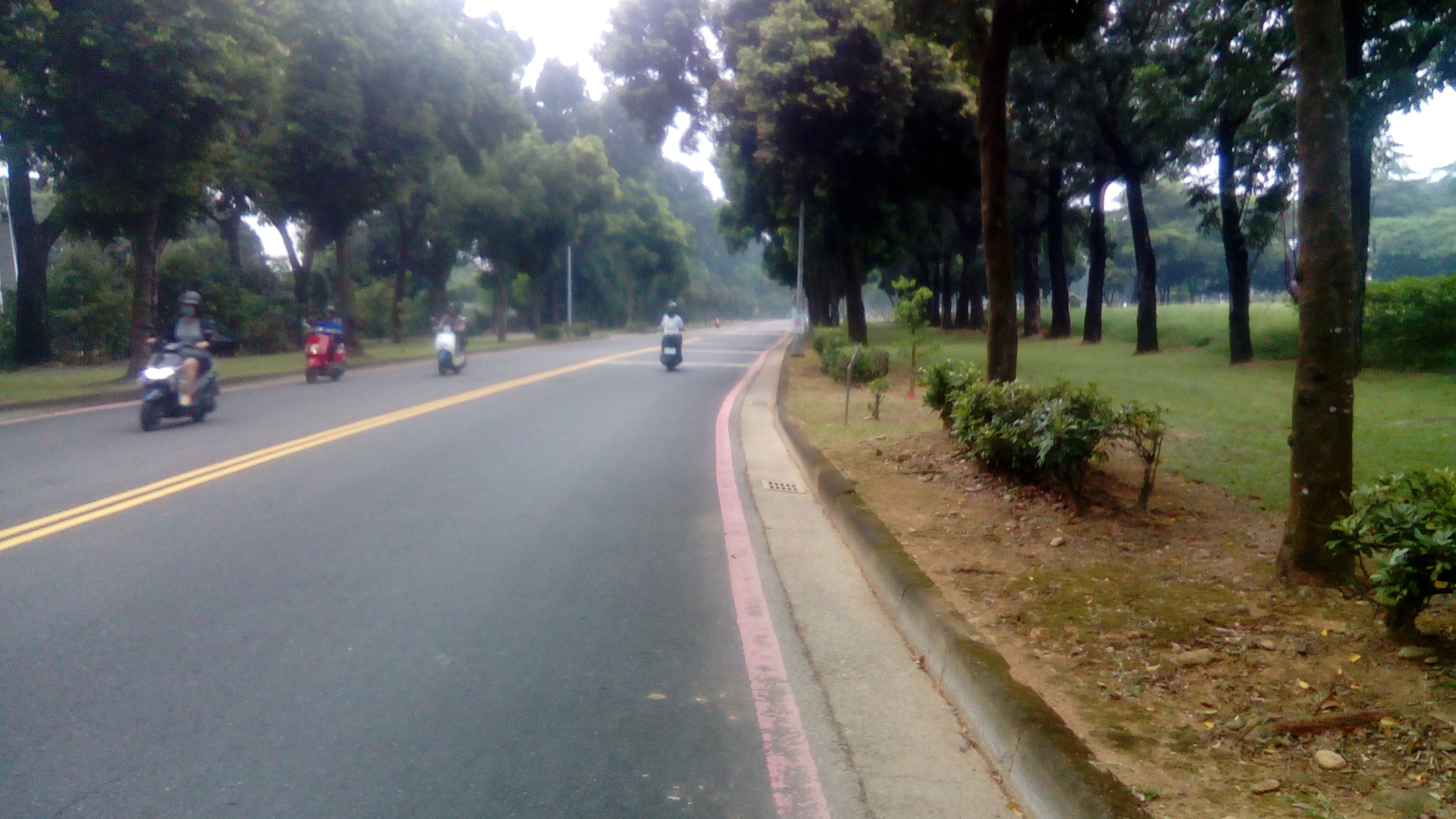 校園環西路，可通往機械及幼保等系。